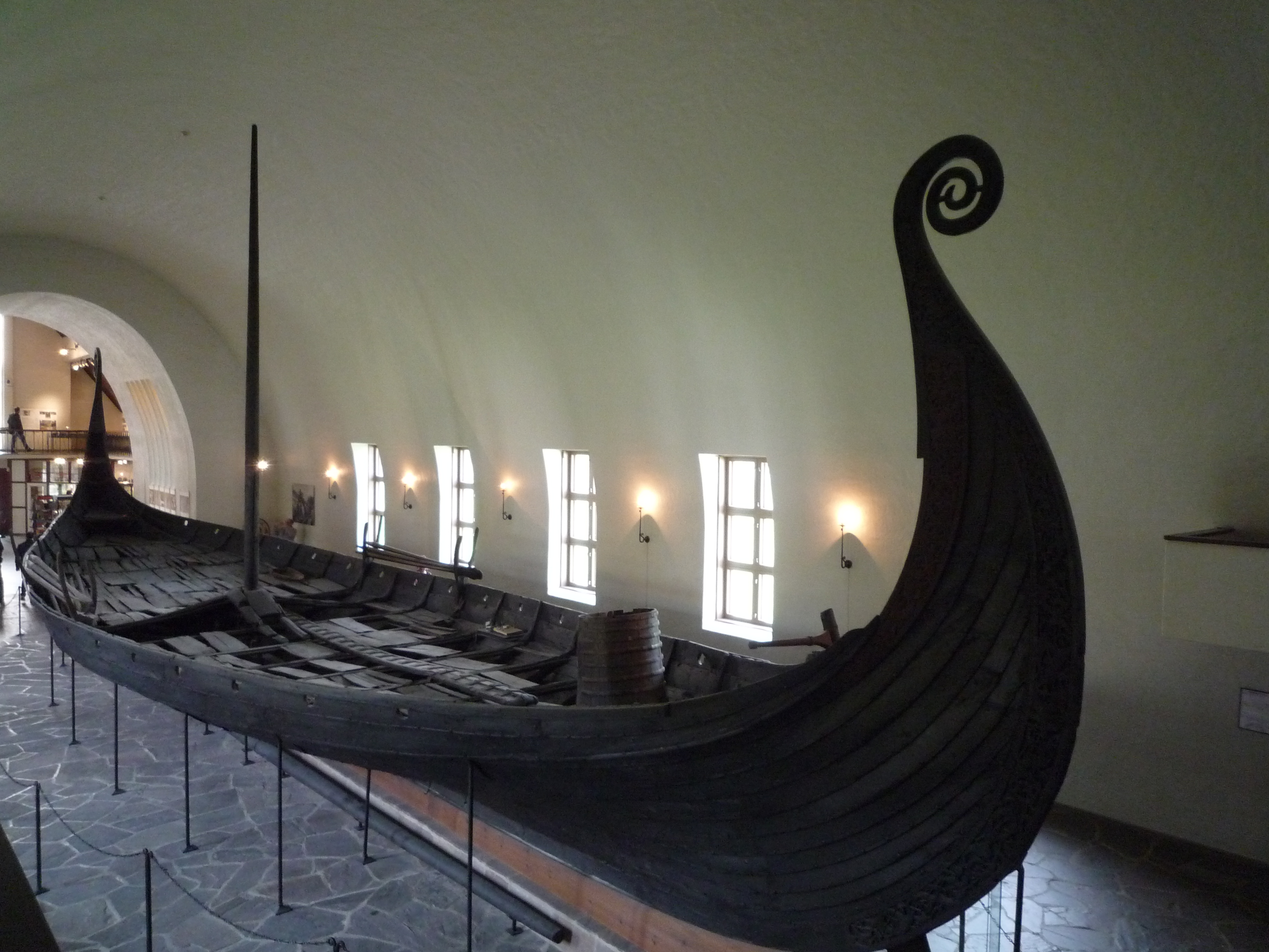 Осебергский корабль